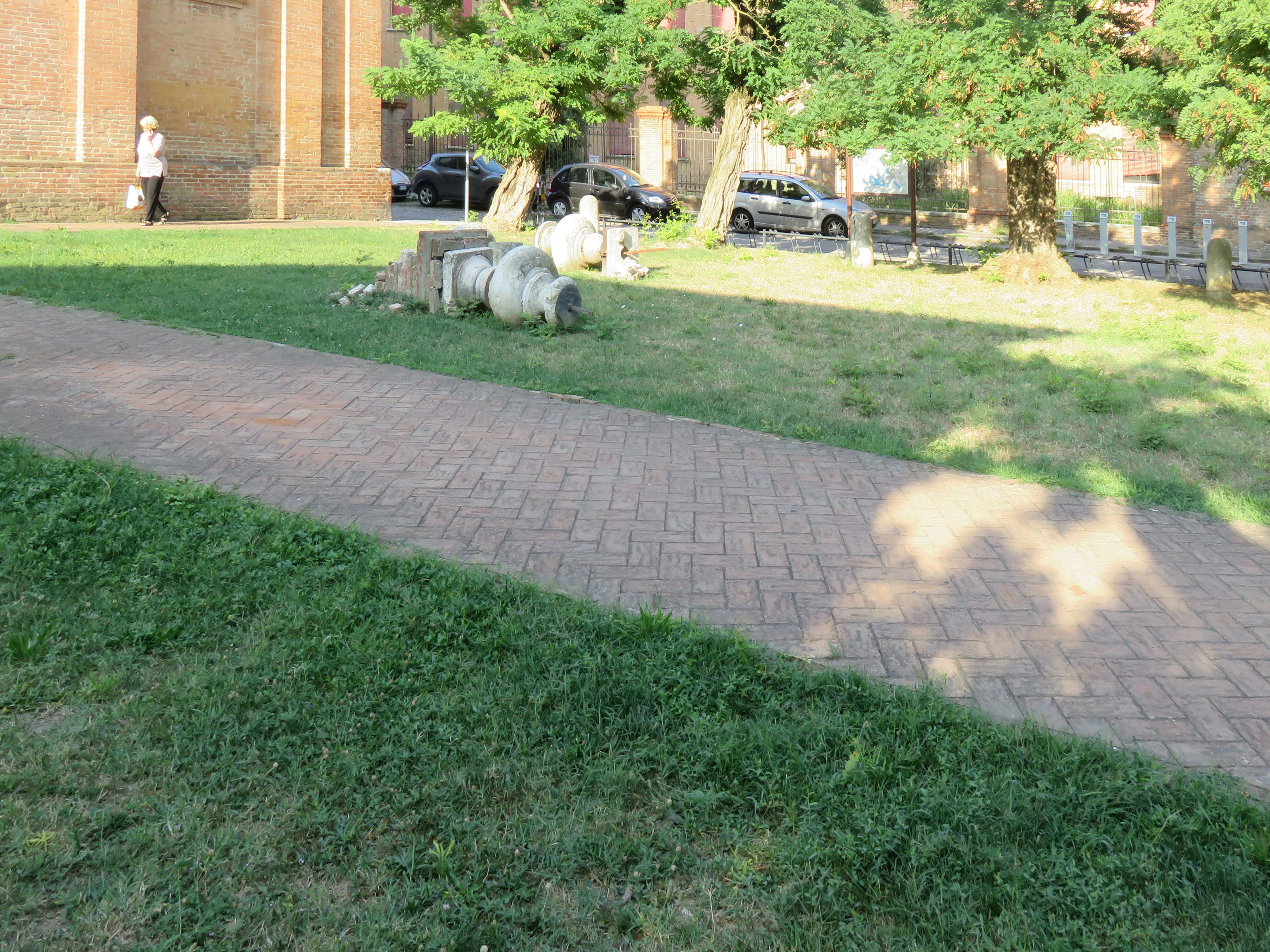 Chiesa di San Girolamo a Ferrara. Dopo il terremoto dell'Emilia del maggio 2012 le guglie decorative sono state rimosse per sicurezza e sono state lasciate nel giardino antistante.